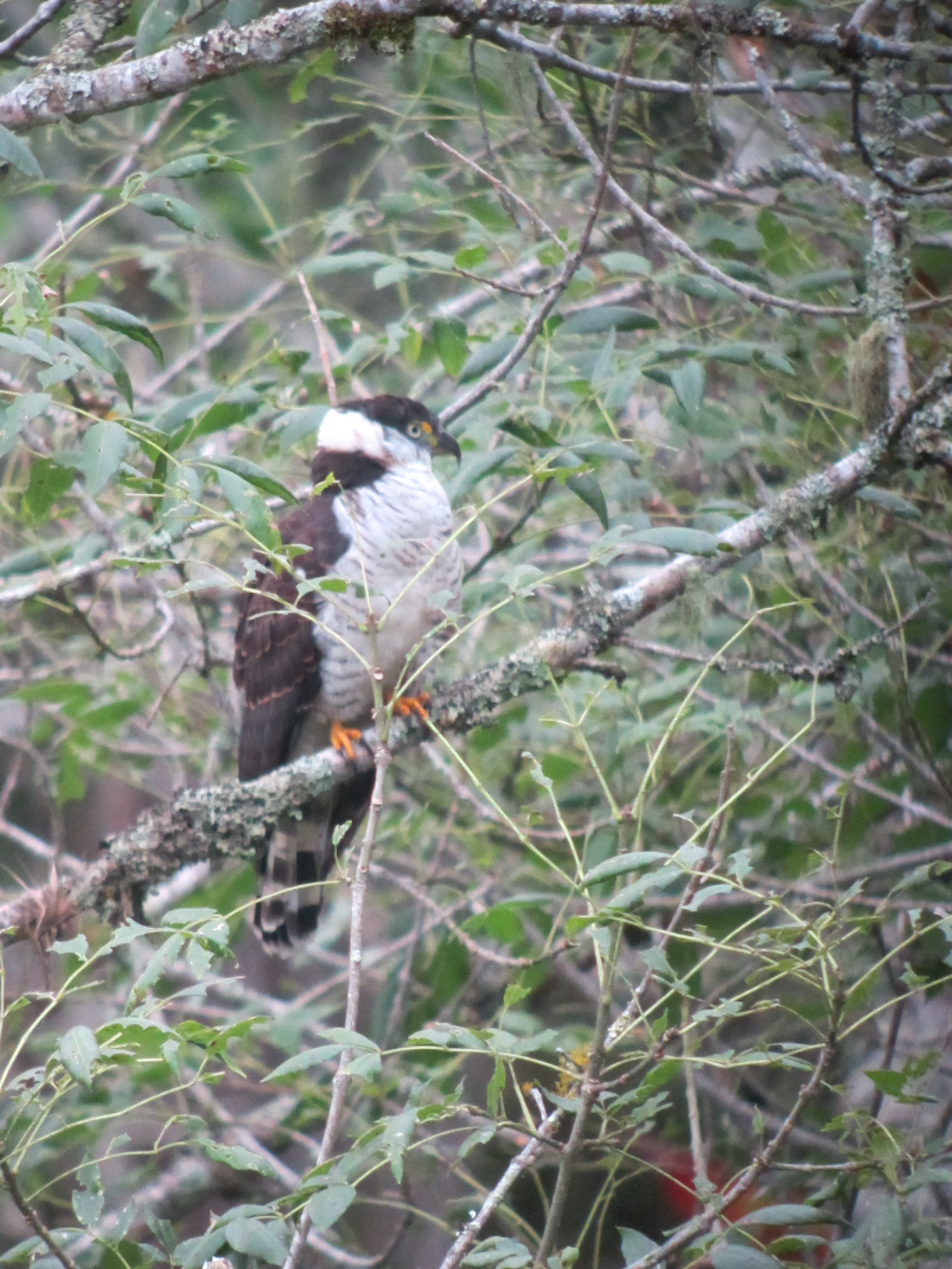 Líbano, Tolima, Colombia